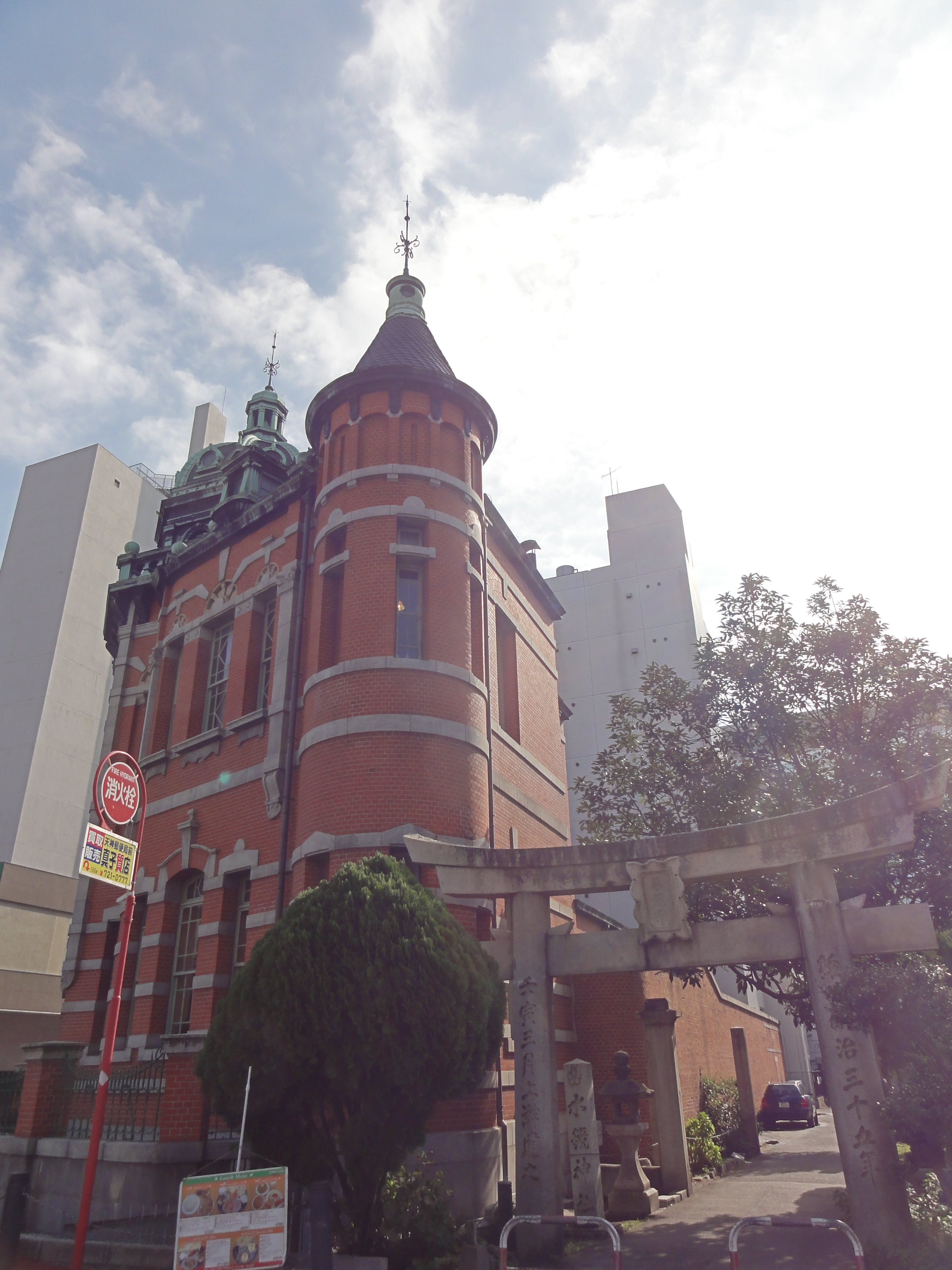 福岡市文化館と水鏡天満宮の裏側の入口です。